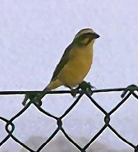 Voorbeeld ruis verminderen. Bewerkt detail van foto.